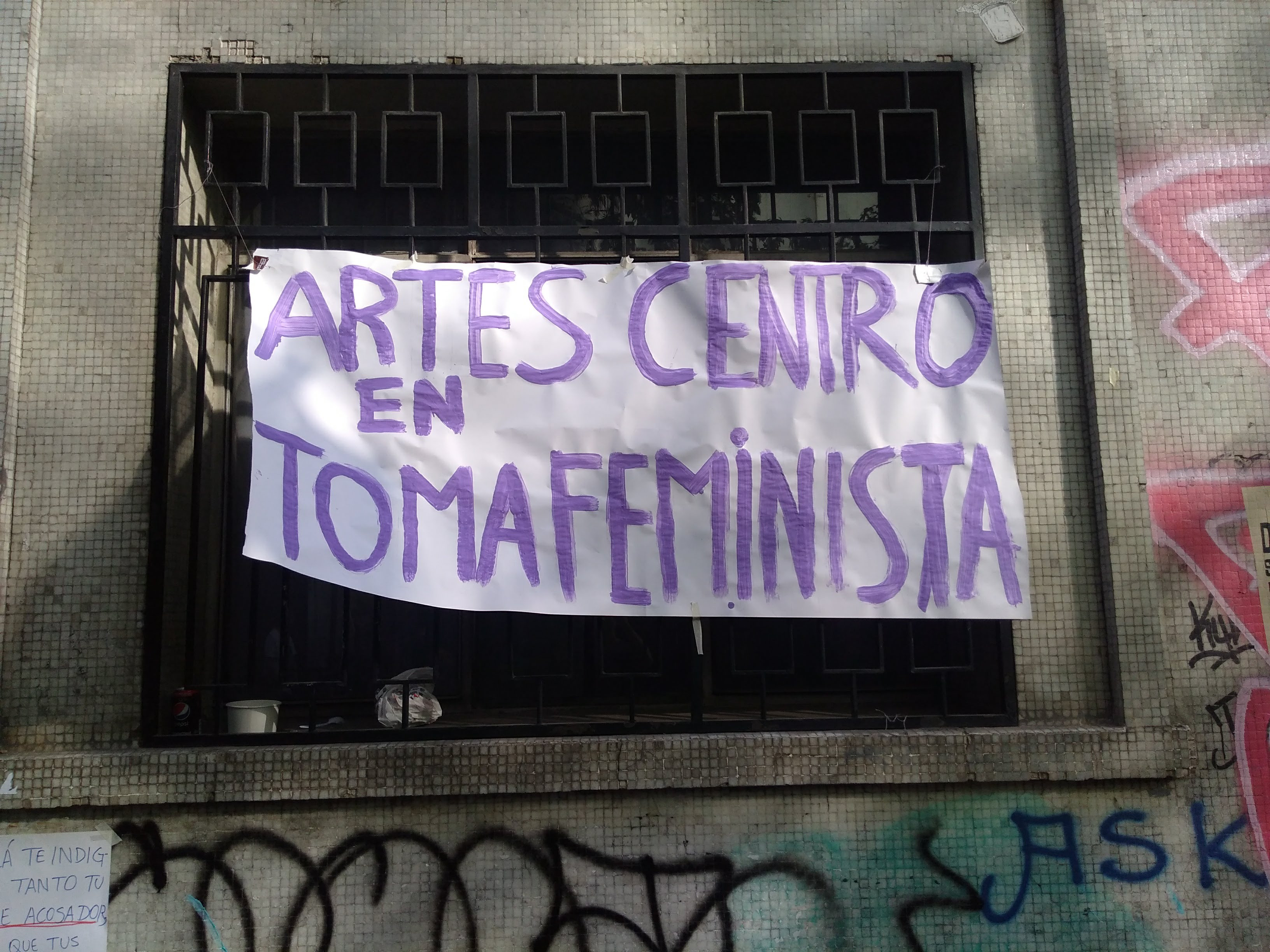 Pancarta de protesta de toma feminista 2018 en el Instituto de Artes de la Universidad de Chile